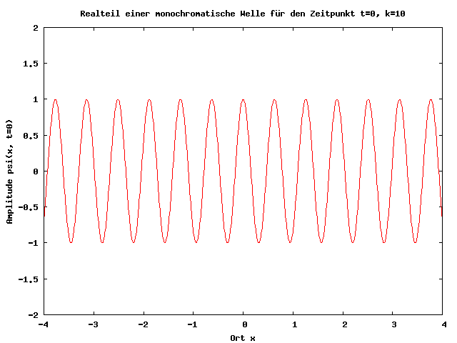 monochromatische Welle (cos-Funktion)